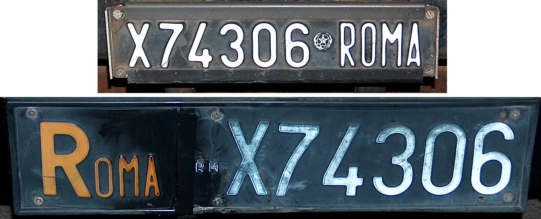 Kfz-Kennzeichen aus Italien (Rom), alte Serie vor 1985, front und heck selbstfotografiert, 2005, GNU-Lizenz